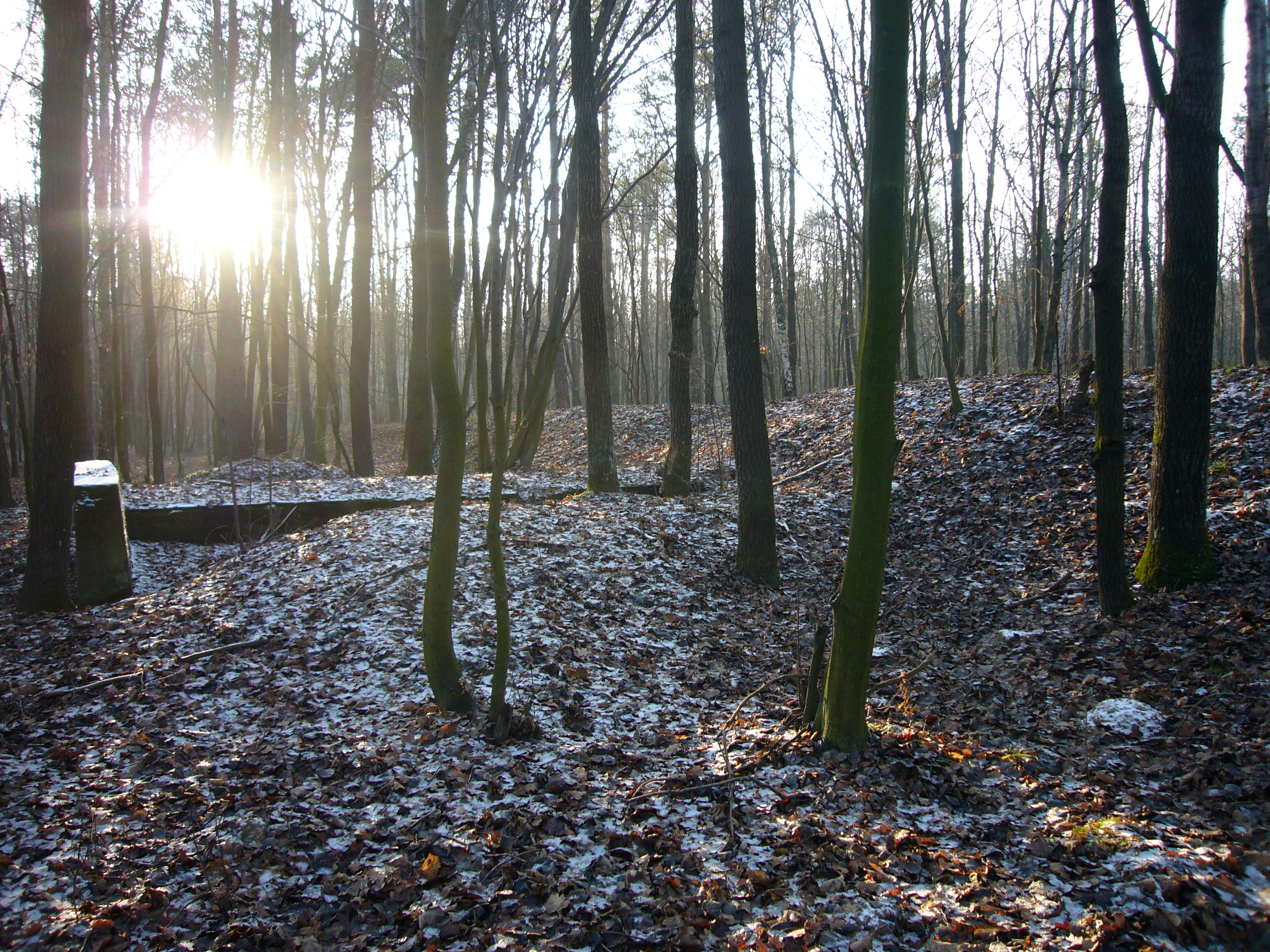 zdjecie wykonane grudzień 2006 w lesie "za torami" w Niedrzwicy Dużej.